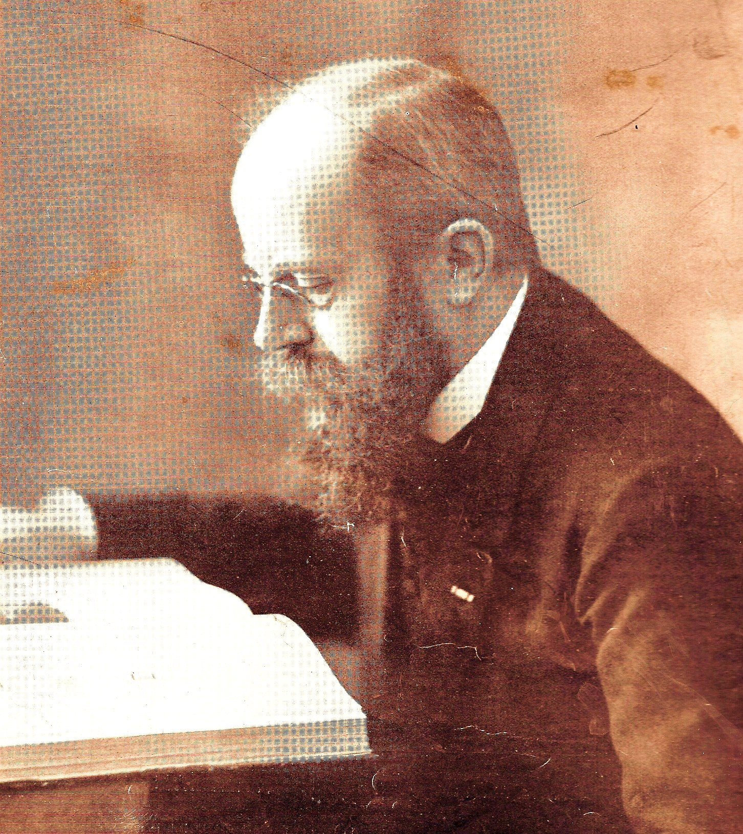 Prof. Dr. C.A. Veerijn Stuart